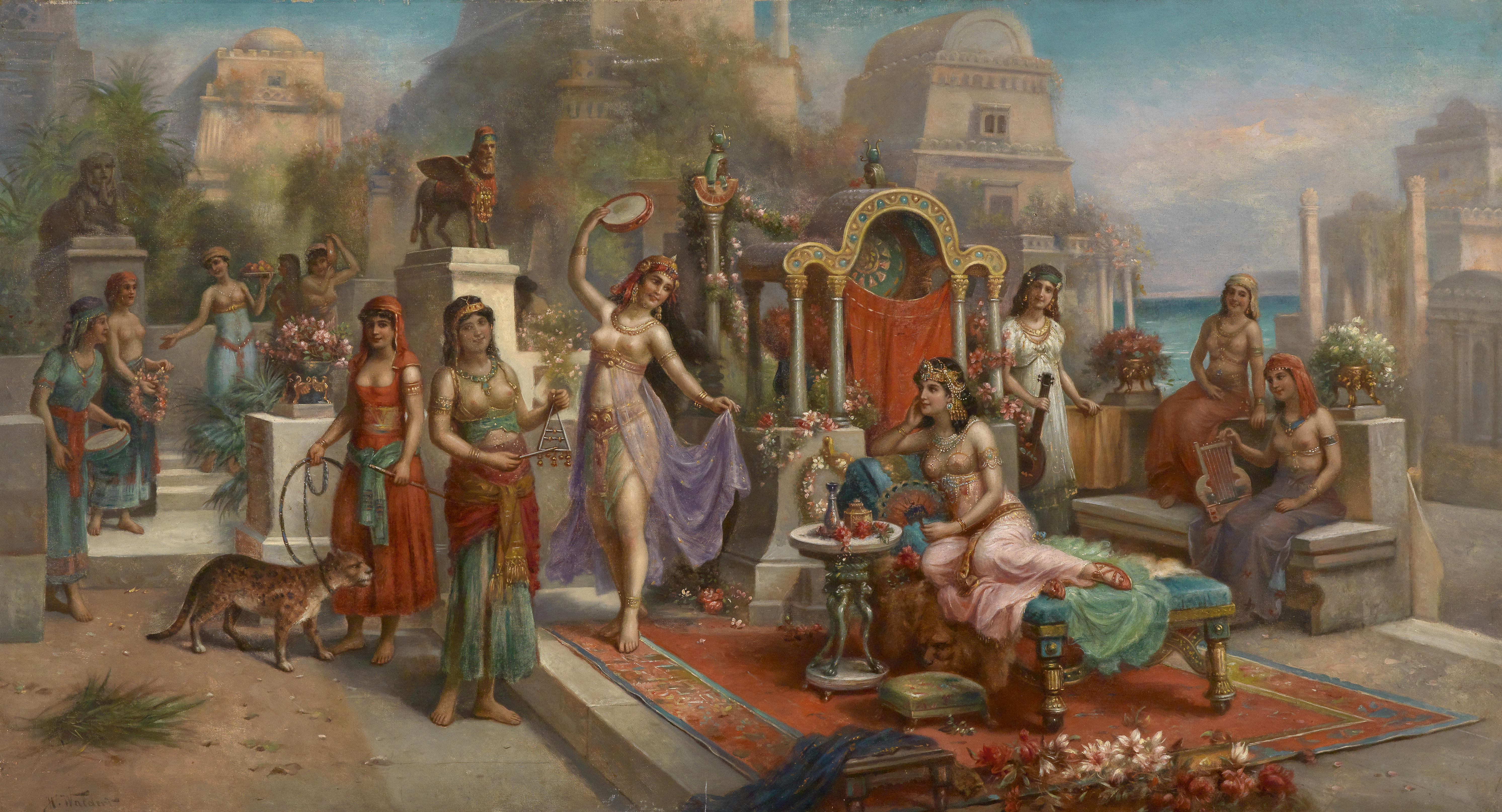 "Hängende Gärten der Semiramis", signiert H. Waldeck, Öl auf Leinwand, 94,5 x 174 cm